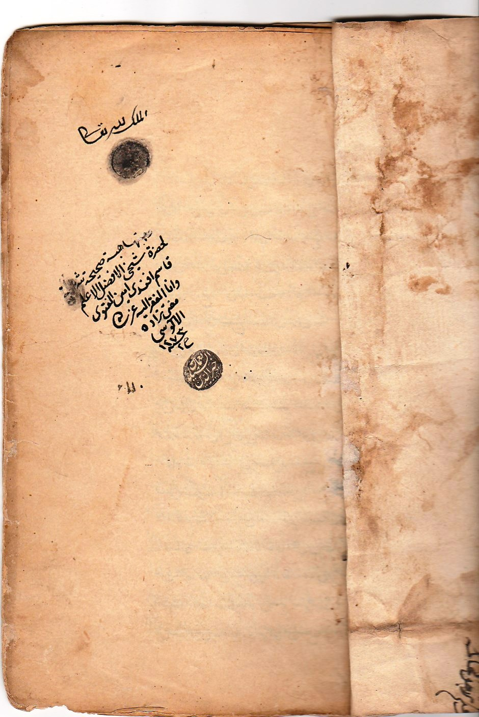 غلاف كتاب (تشريح الأفلاك) في علم الهيئة، من تأليف بهاء الدين العاملي وعليهِ ختم واهداء الشيخ نعمان خير الدين الآلوسي إلى استاذهِ وشيخه ملا قاسم أفندي المفتي عام 1273هجري/ 1856م، في بغداد